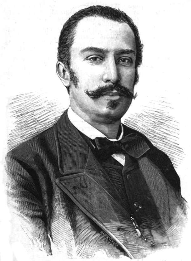 Giovanni Giolitti